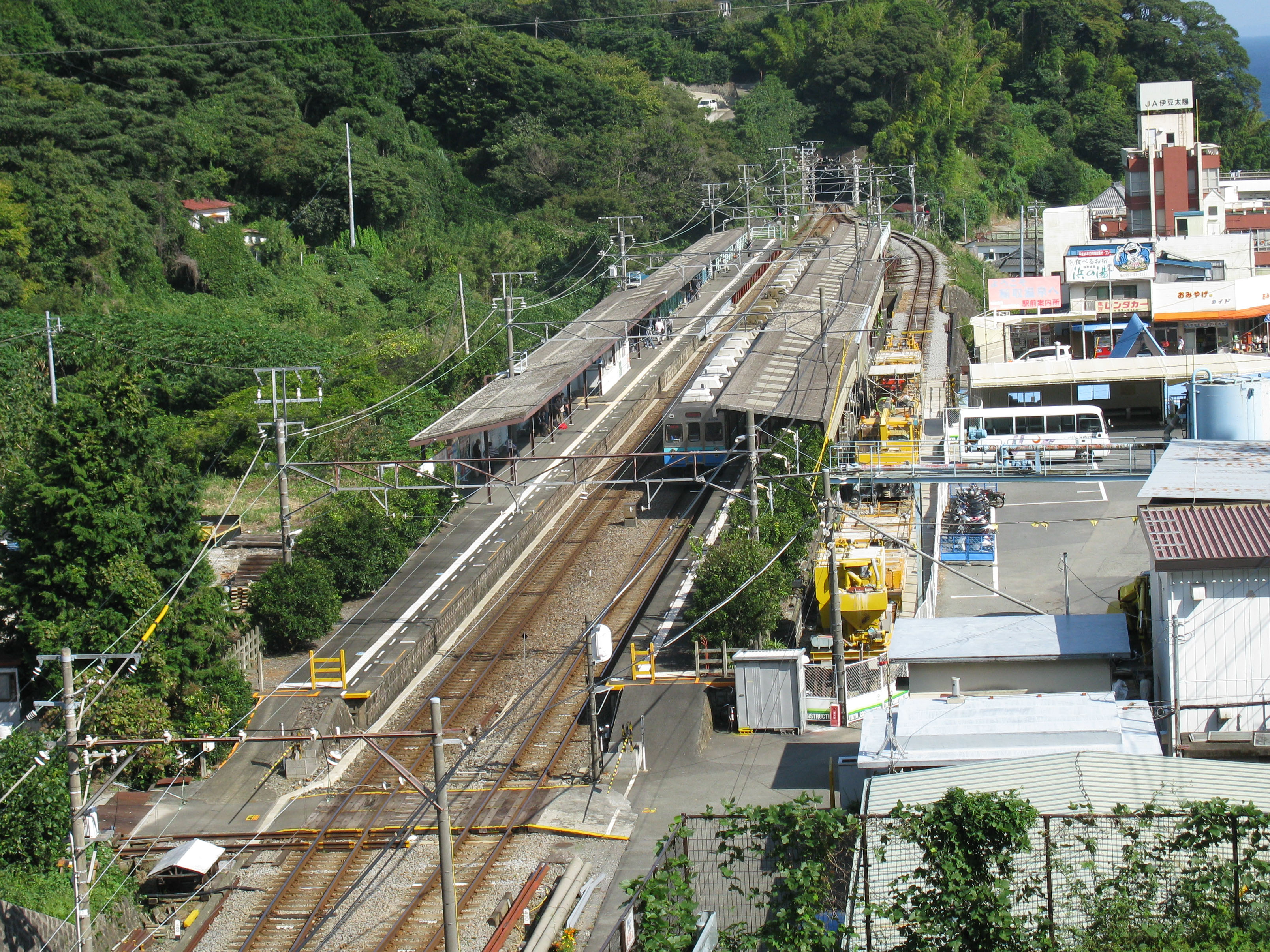 伊豆稲取駅全景（2008年投稿者撮影）